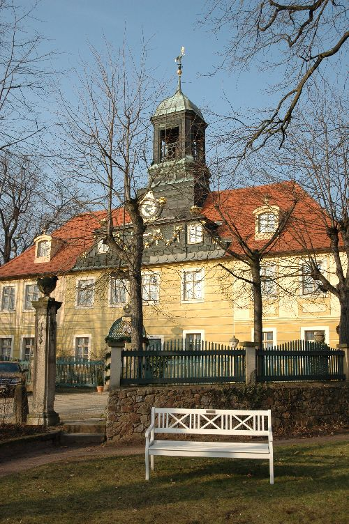 Haus Sorgenfrei Gebäude